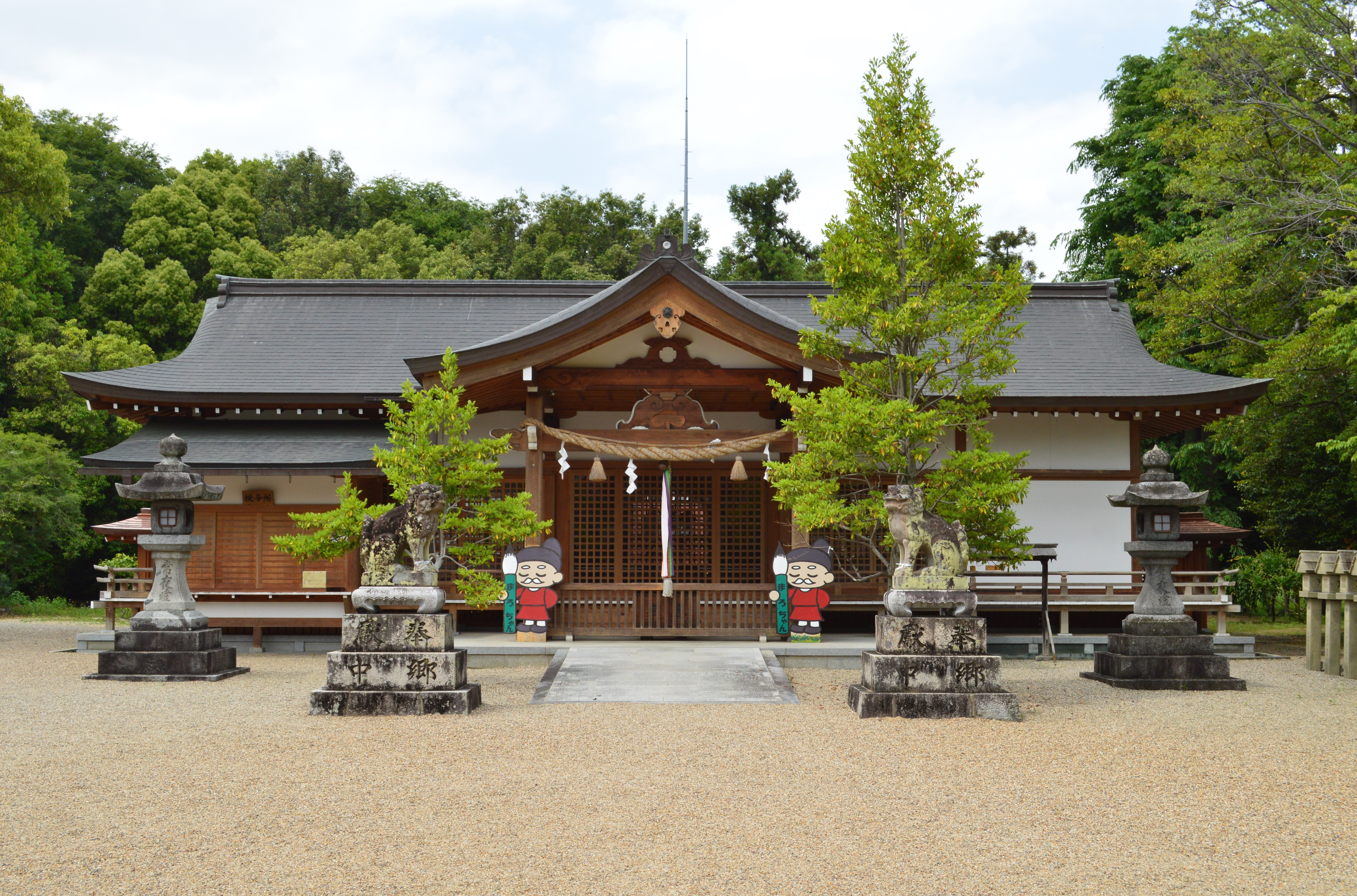 多神社 拝殿